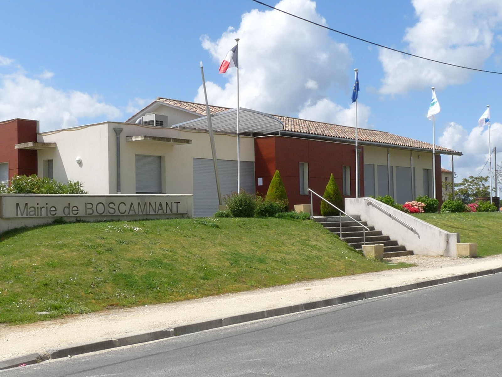 Boscamnant, Charente-Maritime, France